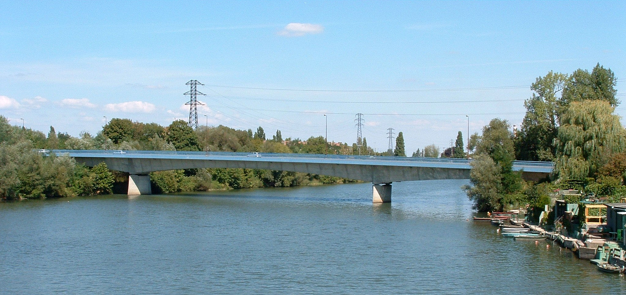 Metz - Pont Jean-Monnet - Ensemble - Vu de l'amont